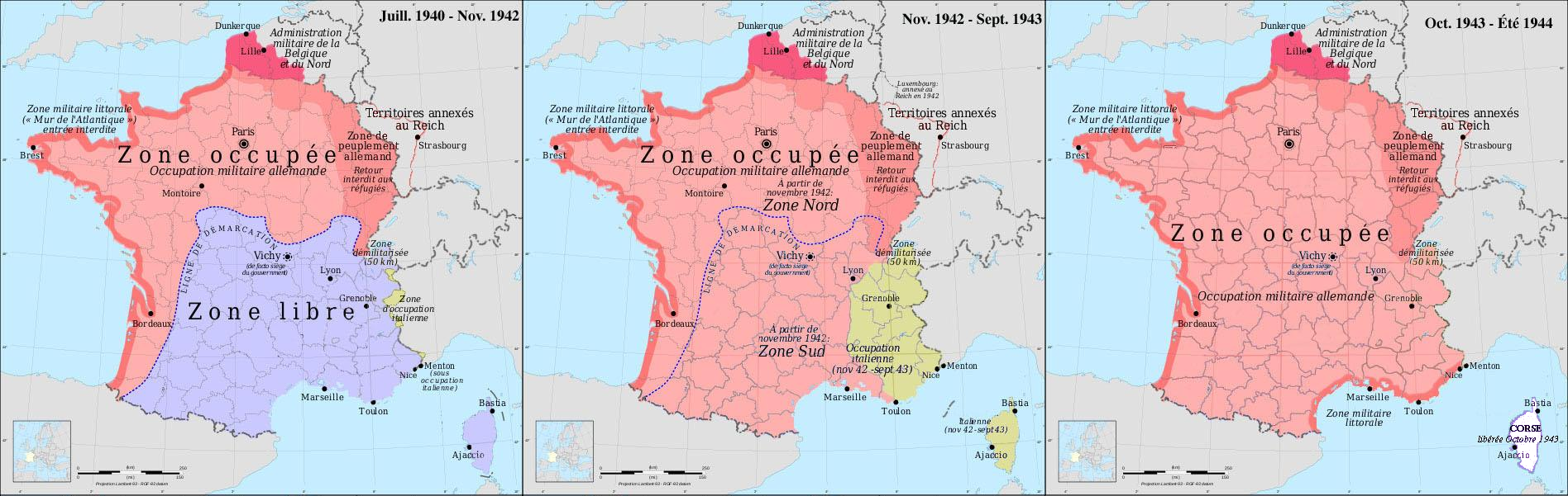 Évolution des zones d'occupation en France durant la seconde guerre mondiale.